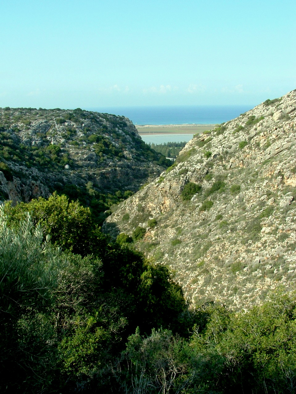 View from Sfunim Wadi - Mount Carmel Israel, Part of Carmel National Park מראות, נוף ומערות בנחל ספונים בהר הכרמל. הנחל הינו חלק מפארק הכרמל. הנחל שימש להתיישבות בתקופות הפרהיסטוריות. שרידים נמצאו בחפירות ארכאולוגיות בנחל ובמערות, כגון מערת ספונים